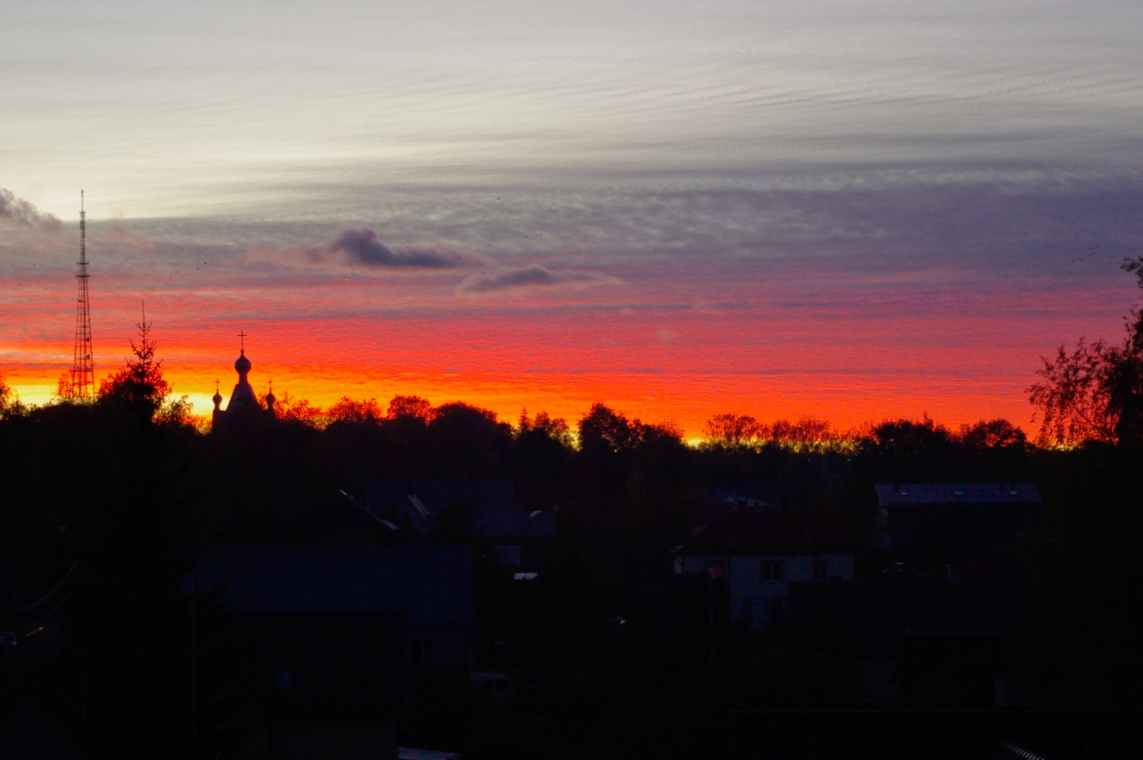 Ehapuna Tartus Karlova linnaosa taustal